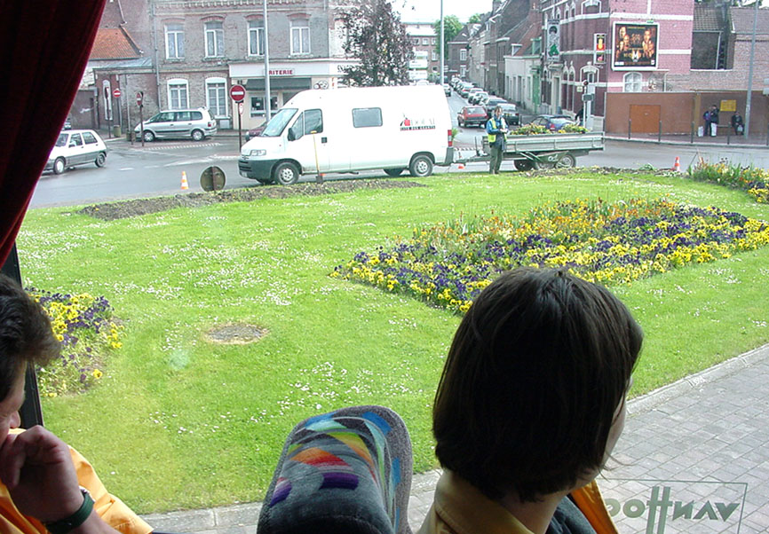 Dispositif de démonstration de l'association ADOPTA ; association Loi 1901 réunissant la ville de Douai, le Conseil régional du Nord Pas-de-Calais et l'Agence de l'eau Artois picardie, dédiée à l'expérimentation et à la prompotion de techniques alternatives de lutte contre les inondations et le ruissellement urbain. Ce rond point fleuri cache plusieurs dizaines de mètre cube d'une structure réservoir qui peut en quelques dizaines de minutes absober le surplus d'eau d'une forte pluie d'orage, avant qu'elle ne ruisselle vers un point bas où elle provoquait autrefois des inondations.